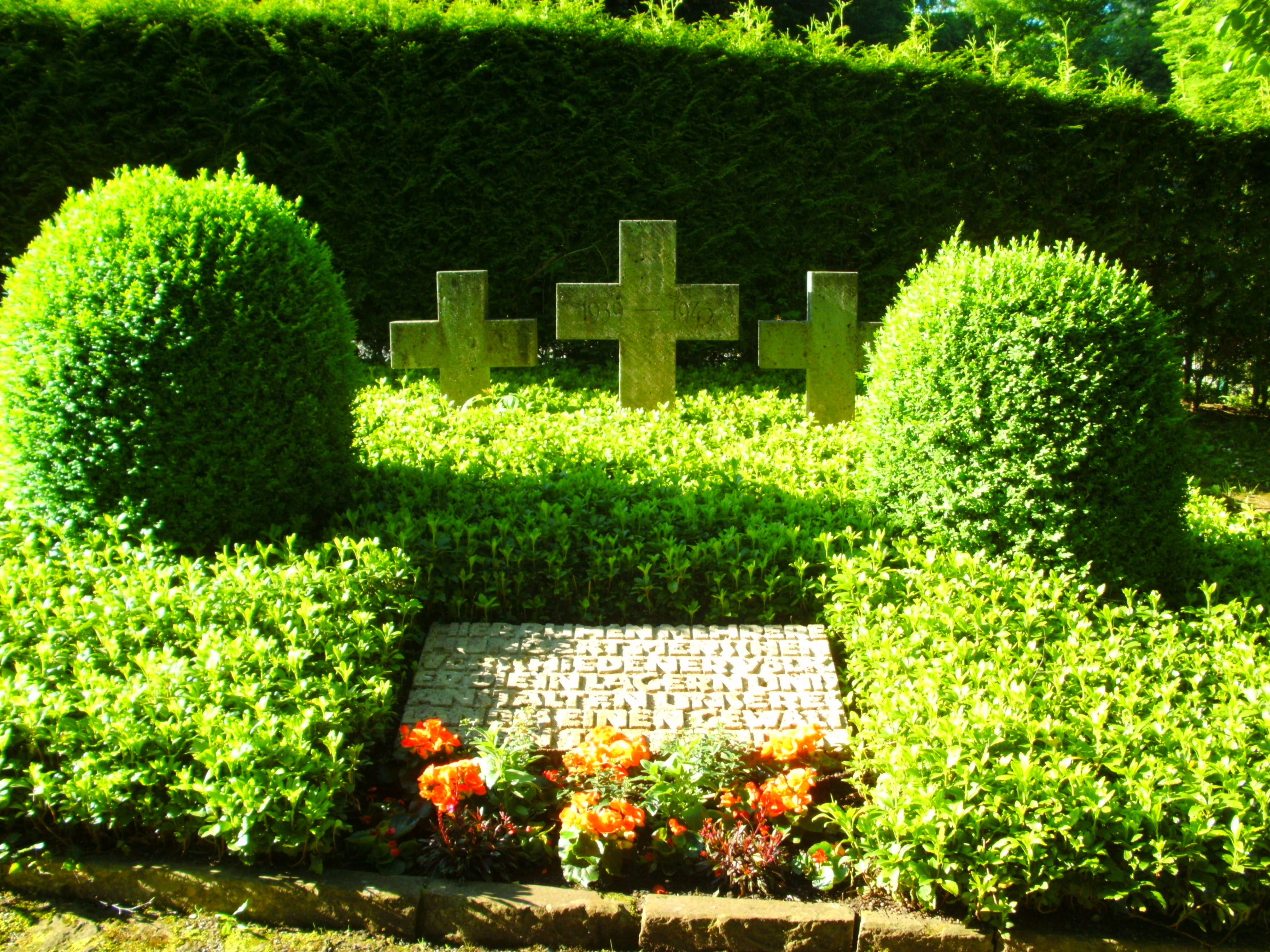 Gräberfeld X (Tübingen)